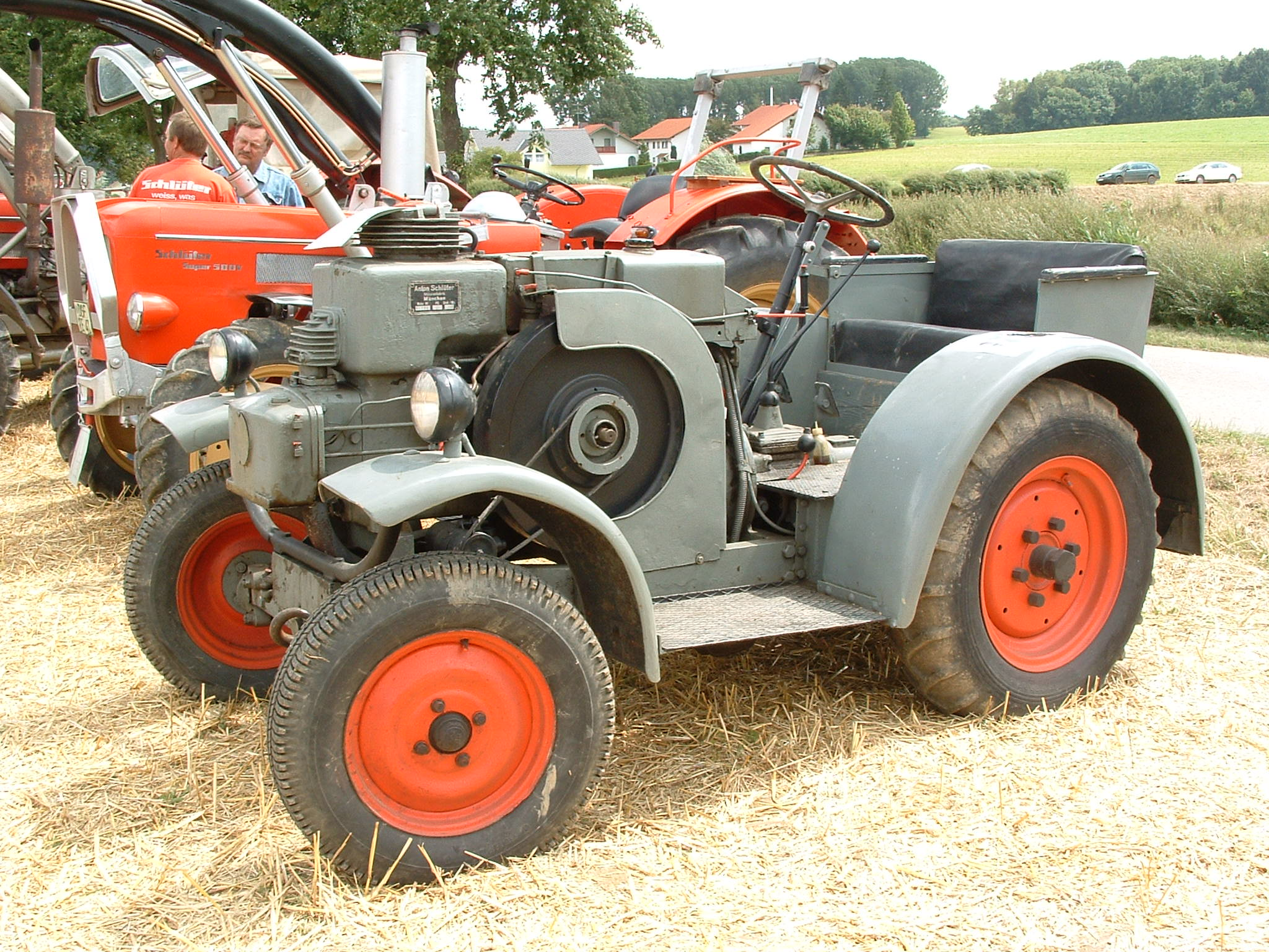 Zweitältester Schlüter-Traktor der Welt, gesehen auf dem Schlütertreffen in Landau a. d. Isar